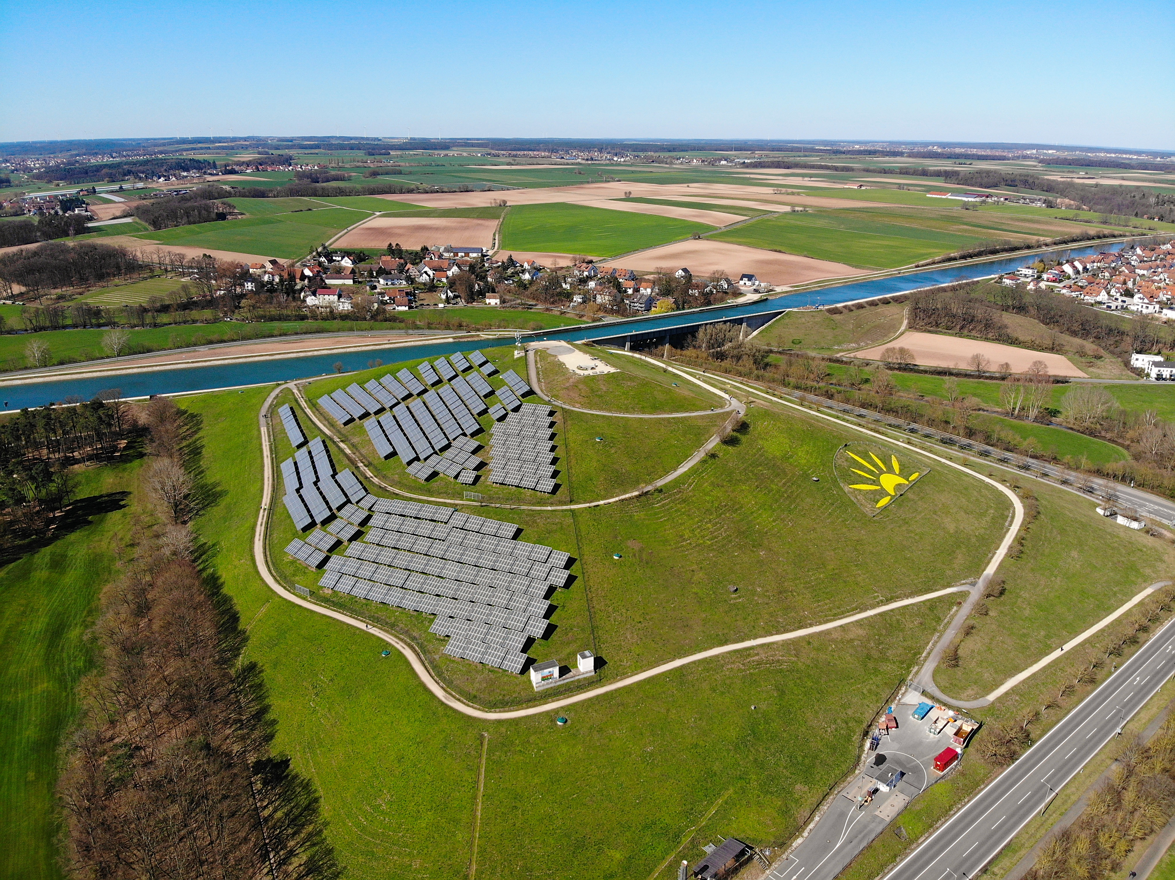 Solarberg Fürth Luftaufnahme (2020)